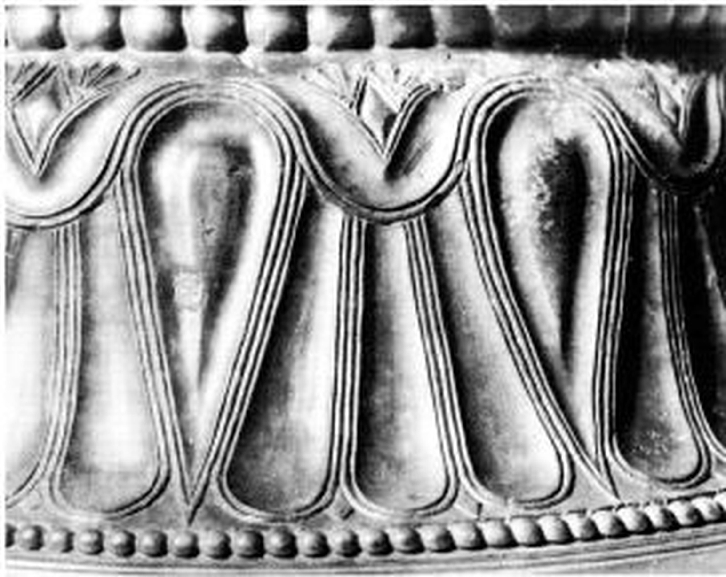 Cratère à volutes, Trebenischte, tombe I